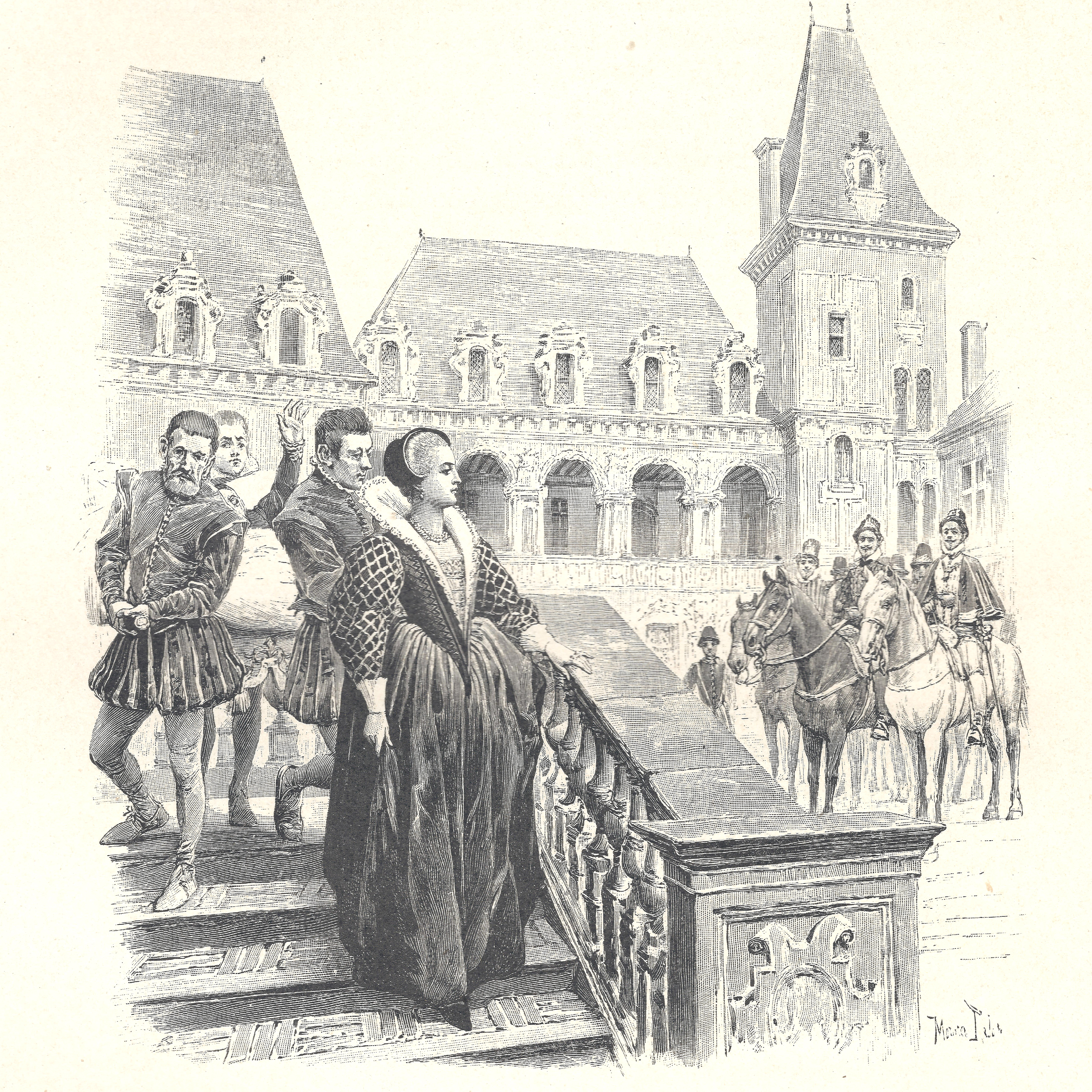 composition de Maurice Leloir et gravure sur bois de Jules Huyot se trouvant p.248 : Diane sortait en effet de la maison, mais immédiatement derrière Diane suivait une civière.